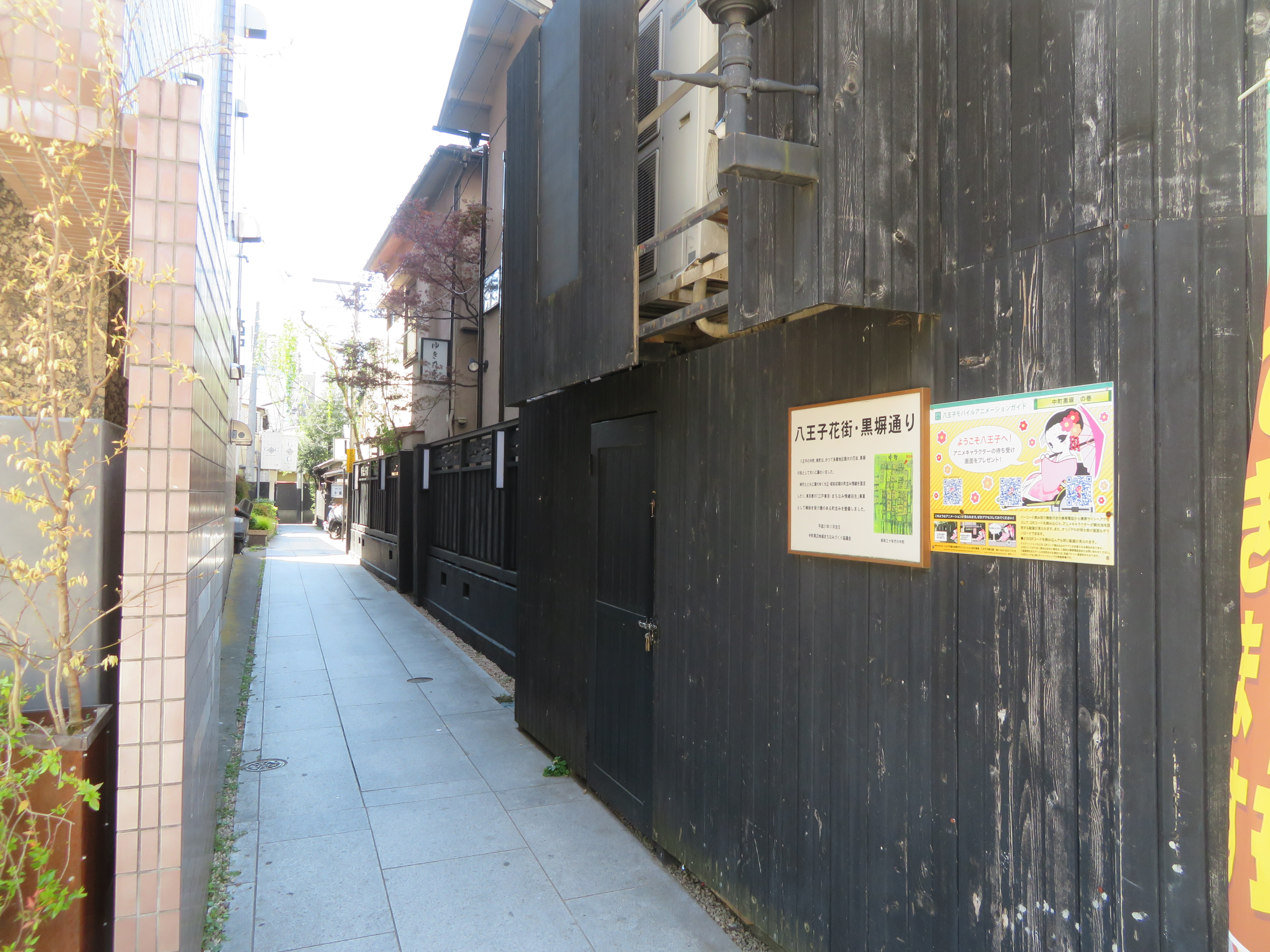 八王子中町の観光スポット